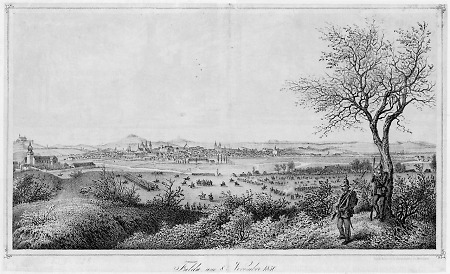 Kreidelithografie mit dem Titel "Fulda am 8. November 1850"